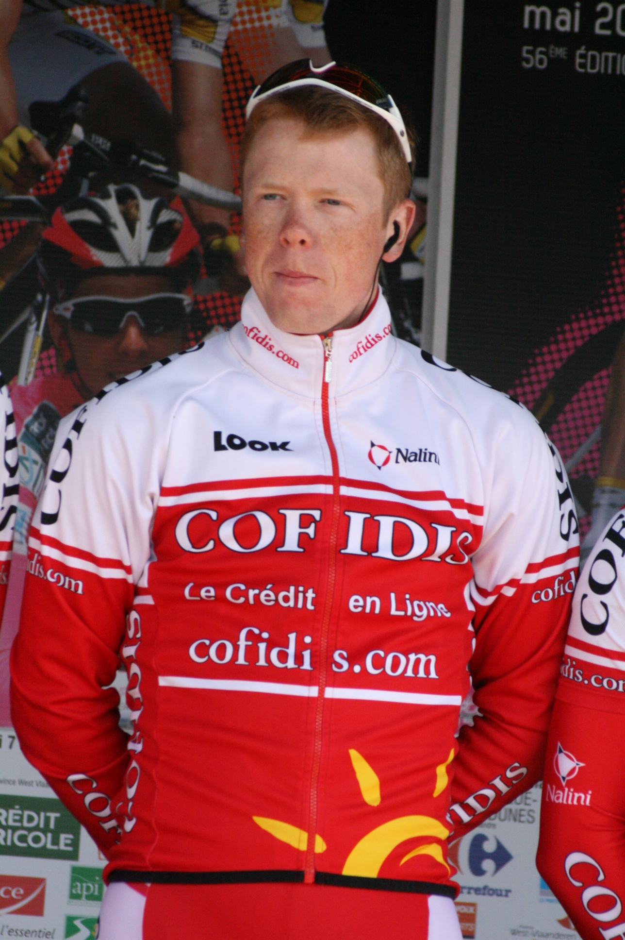 Romain Zingle lors de la présentation des équipes des 4 jours de Dunkerque 2010